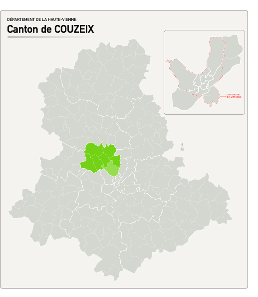 Carte du nouveau canton de Couzeix.